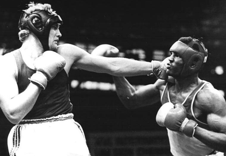 Maik Heydeck, Felix Savon ADN-ZB Lehmann 28.3.87 Halle: XVI. Int. Chemiepokal Turnier im Boxen-Halbfinale-Einen beherzten Kampf lieferte DDR-Vizemeister Maik Heydeck (l.) dem Schwergewichtsweltmeister Felix Savon aus Kuba. Mit einem 4:1 Punktrichterurteil zog der 20jährige mehrfache kubanische Landesmeister ins Finale ein.